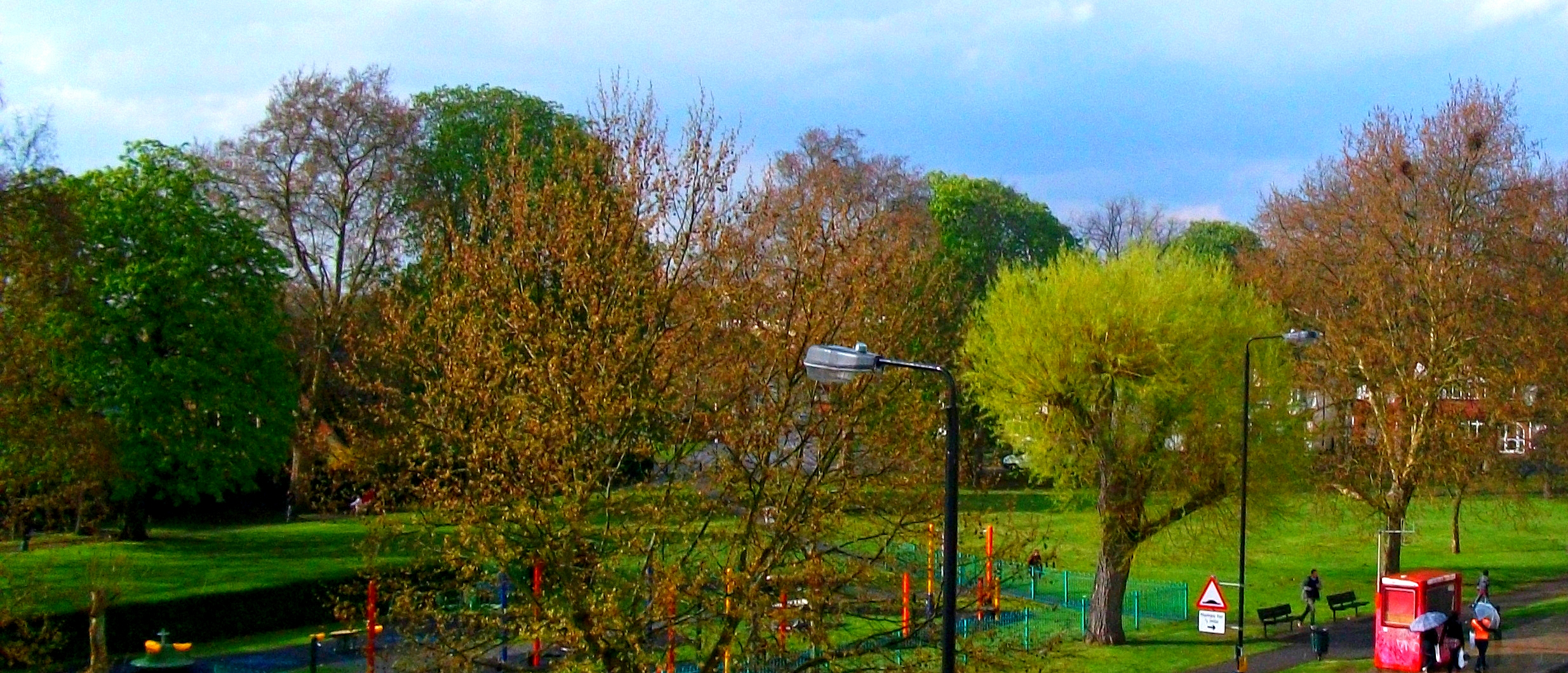 Sutton Green greens 13/04/12.